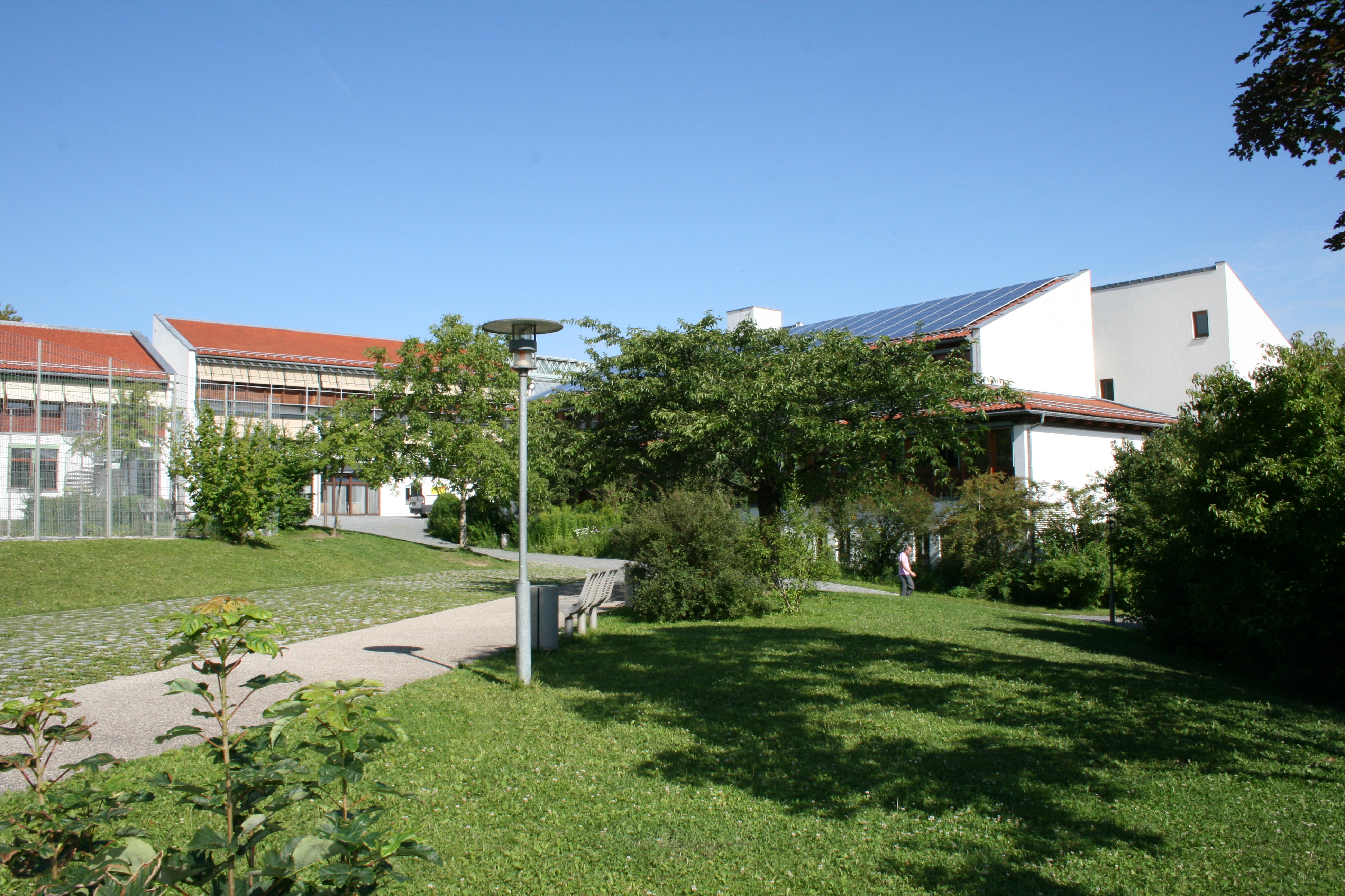 Blick auf das gesamte Schulareal. Karl-Meichelbeck-Realschule, Freising.